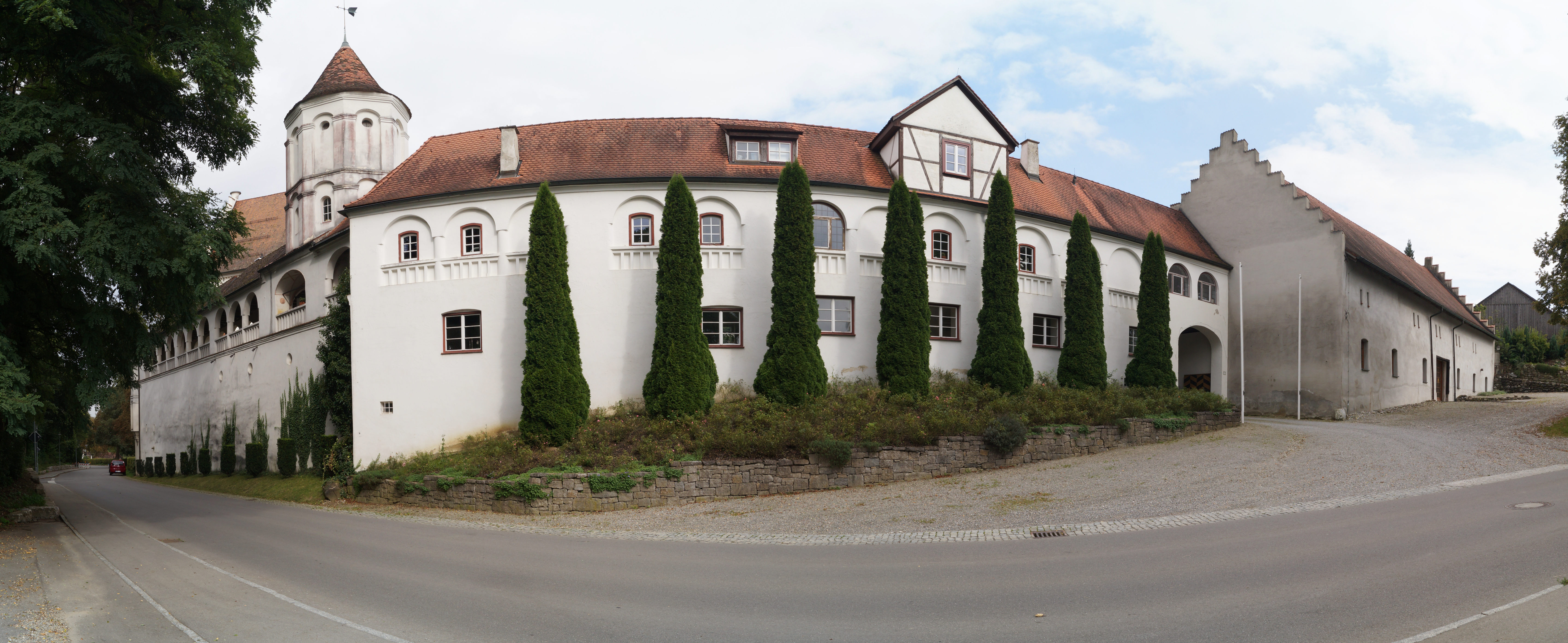 Panorama des Schloß Mittelbiberach